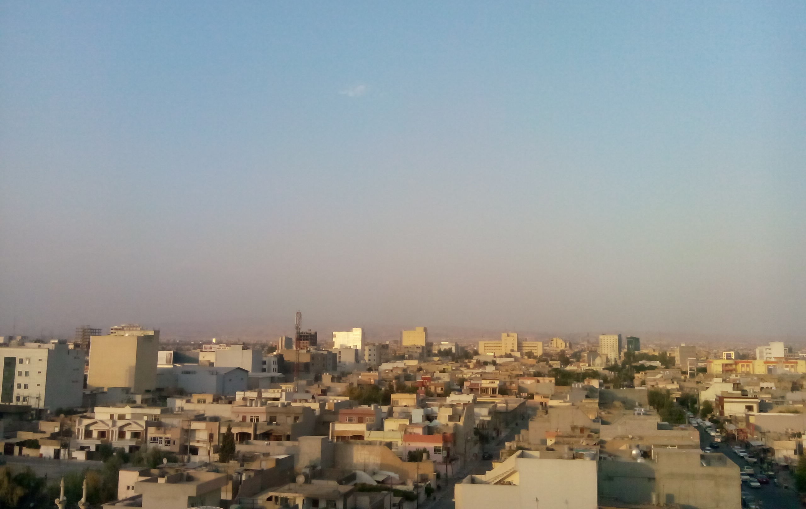 صورة تمثل التوسع العمراني لمدينة اربيل في شمال العراق